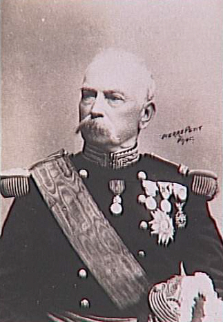 Jean-Baptiste Billot (* 15. August 1828; † 31. Mai 1907), französischer General